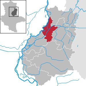 Elbe-Parey im Landkreis Jerichower Land, Sachsen-Anhalt